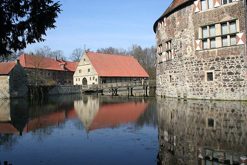 Burg Vischering Brücke und Vorburg